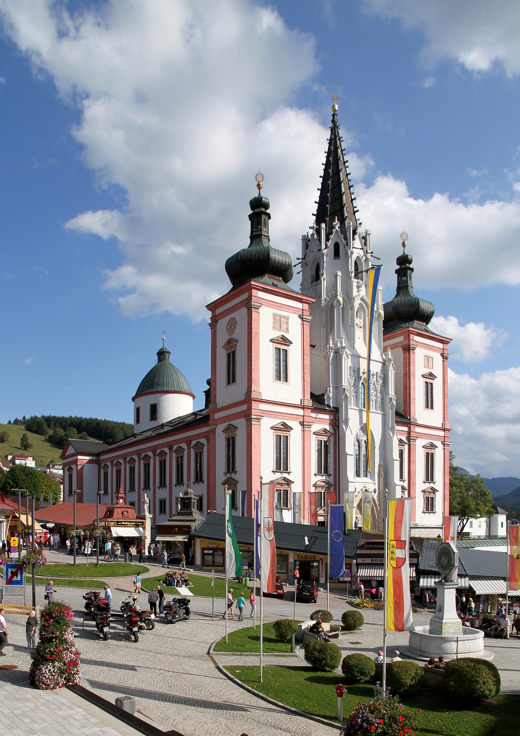 Die Nordwestansicht der Basilika, Pfarr- und Wallfahrtskirche Maria Geburt in der obersteirischen Stadt Mariazell.